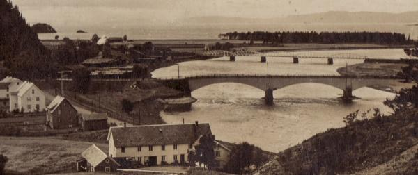 Broene over Stjørdalselva, som forbinder Sandfærhus/Stjørdalshalsen med Hell/Lånke. Veibroen (nærmest) ble ferdigstilt i 1856, mens jernbanebroen ble ferdigstilt i 1902.